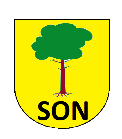 Escut municipal antic de Son (Alt Àneu, Pallars Sobirà)